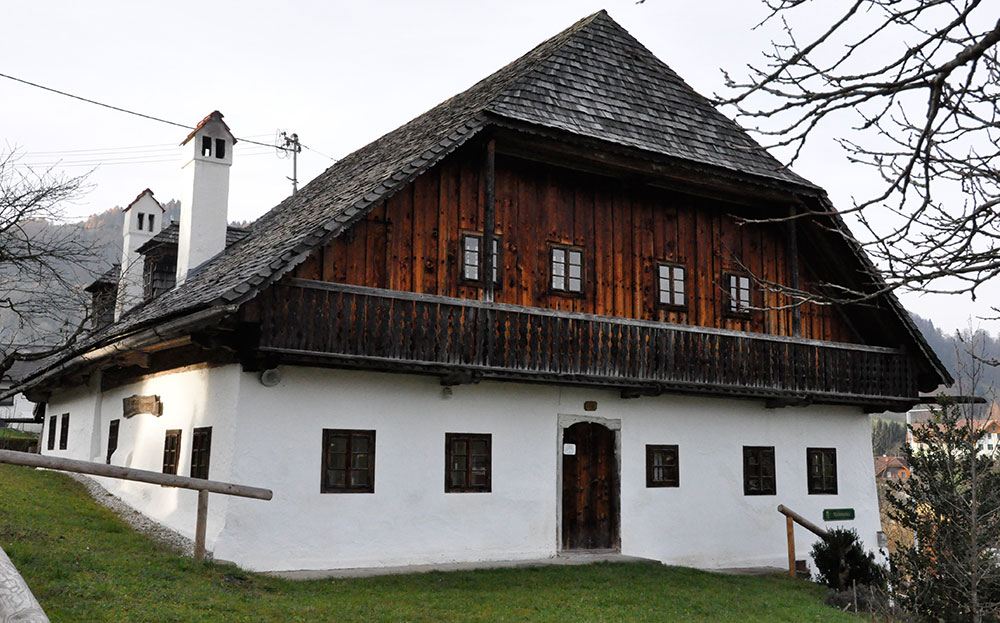 Heimatmuseum